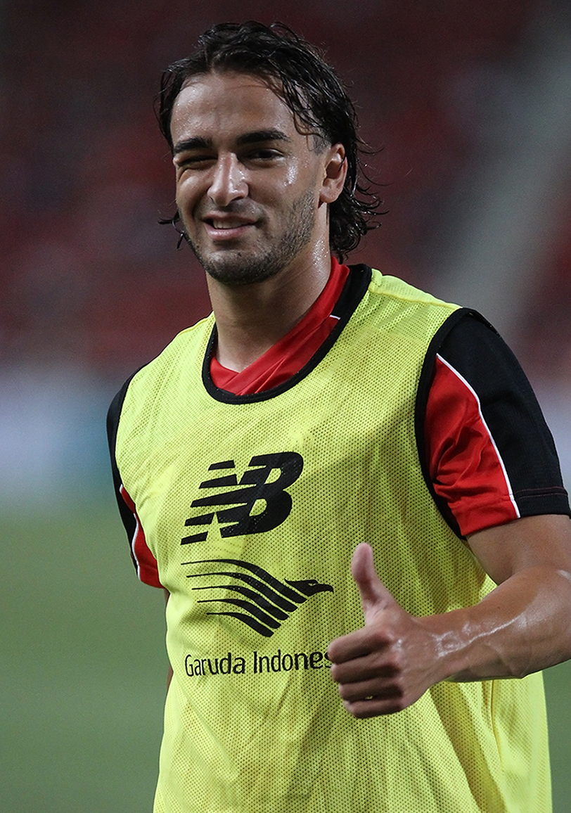 Lazar Marković during 2015 LFC Tour in Bangkok